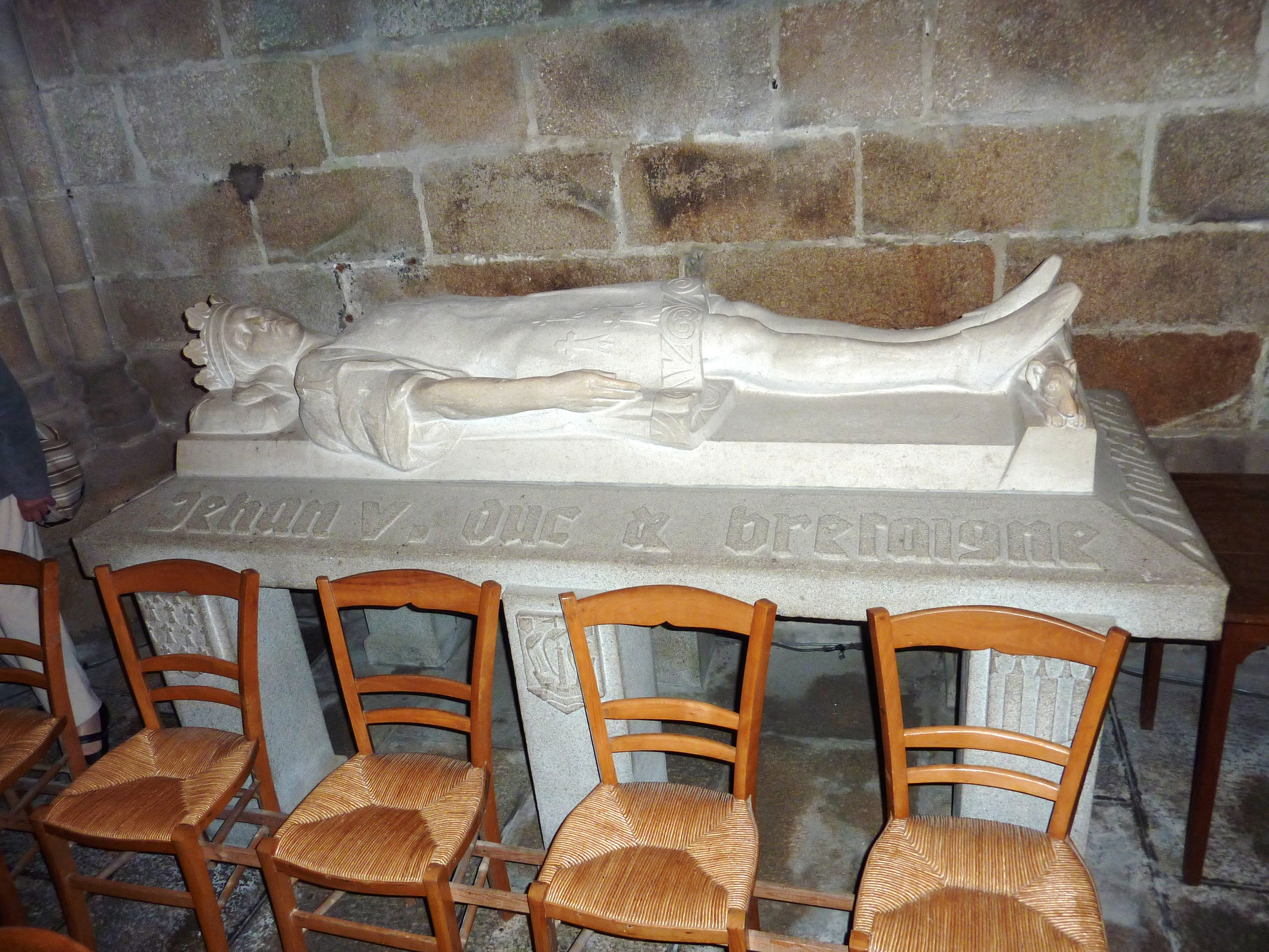 Tréguier : cathédrale Saint-Tugdual: le gisant de Jean V, duc de Bretagne